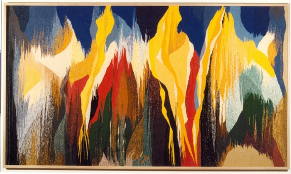 Tapijt Bliksemstralen, 1984